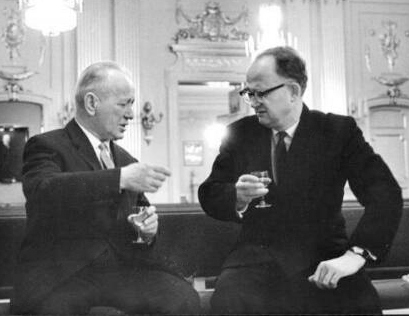 Mikhail Sholokhov (left) and Nikolay Belokhvostikov at the Nobel Prize ceremonies